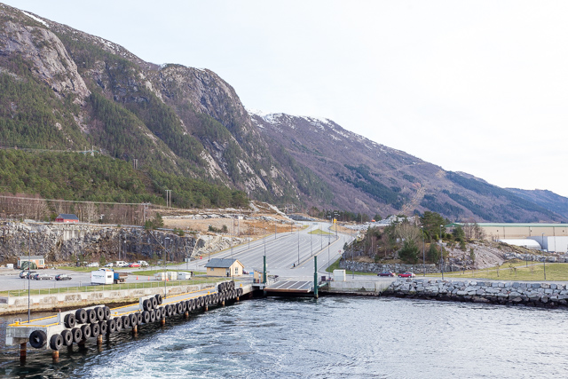 Årsnes fergekai